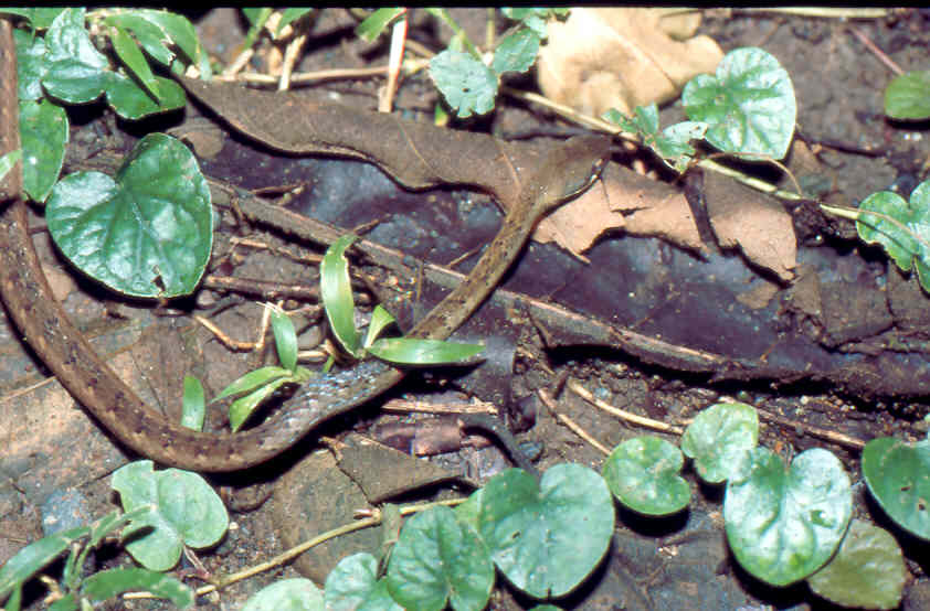 Dendrophidion percarinatus